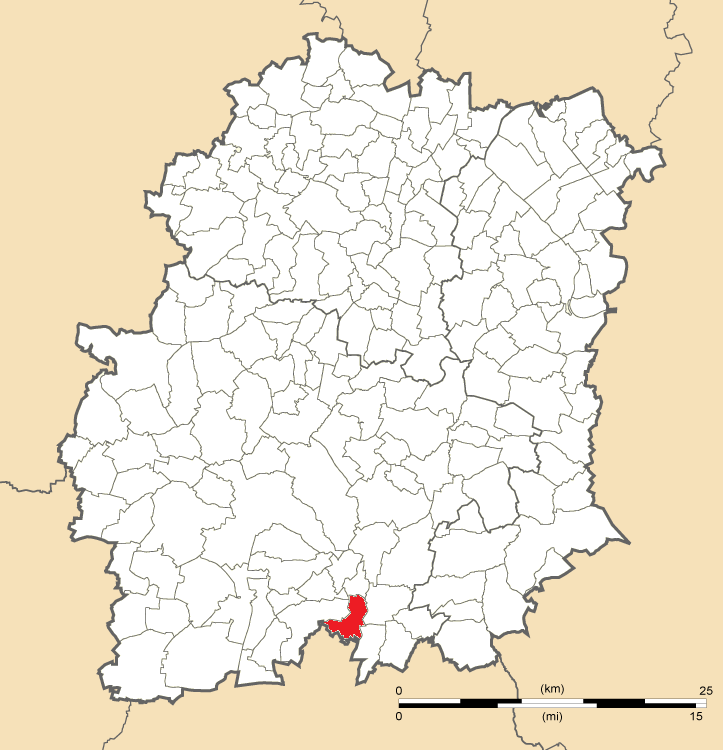 Carte de position de Roinvilliers en Essonne (91)